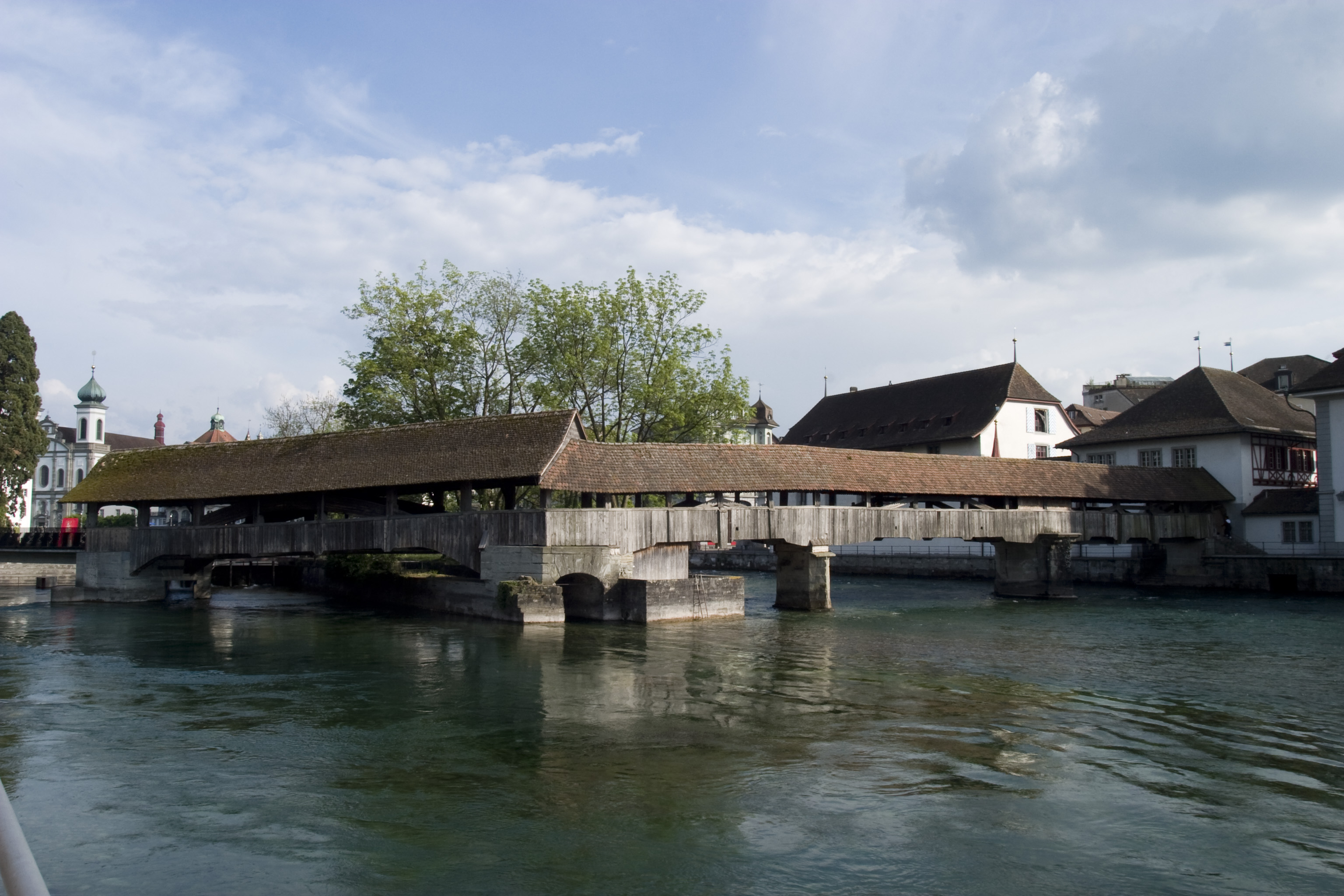 Spreuerbrücke in Luzern, 2007.